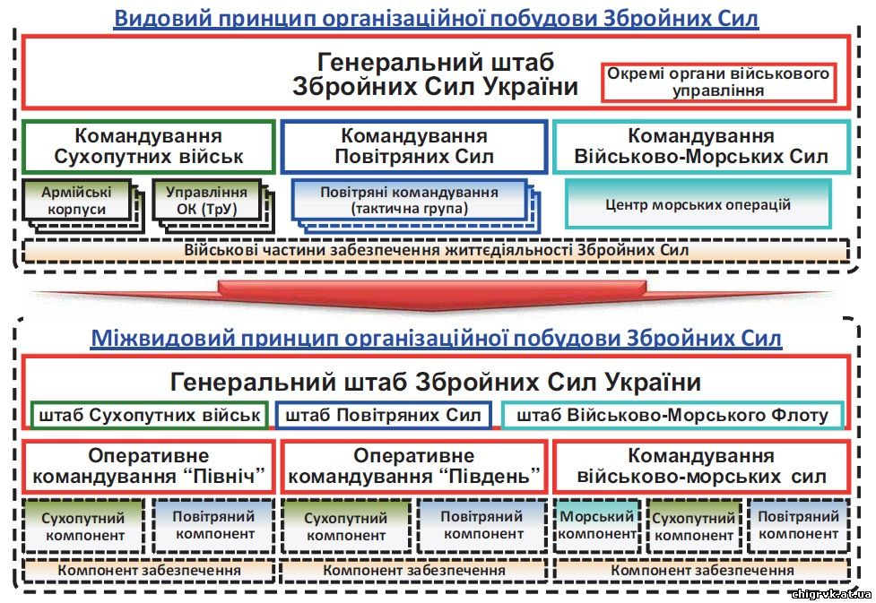 Army of Ukraine structure reform 2017